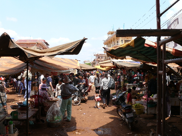 Market in Banlung, Ratanakiri, Cambodia